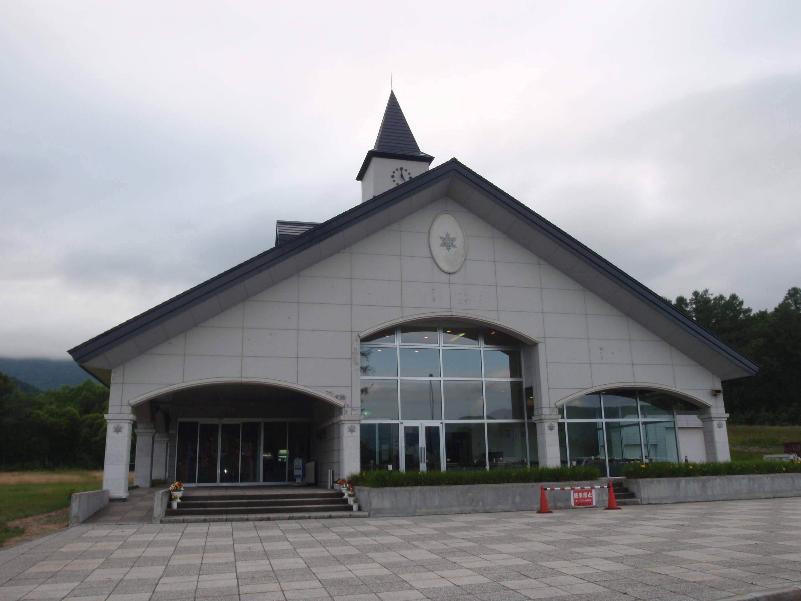 せいわ温泉ルオント。